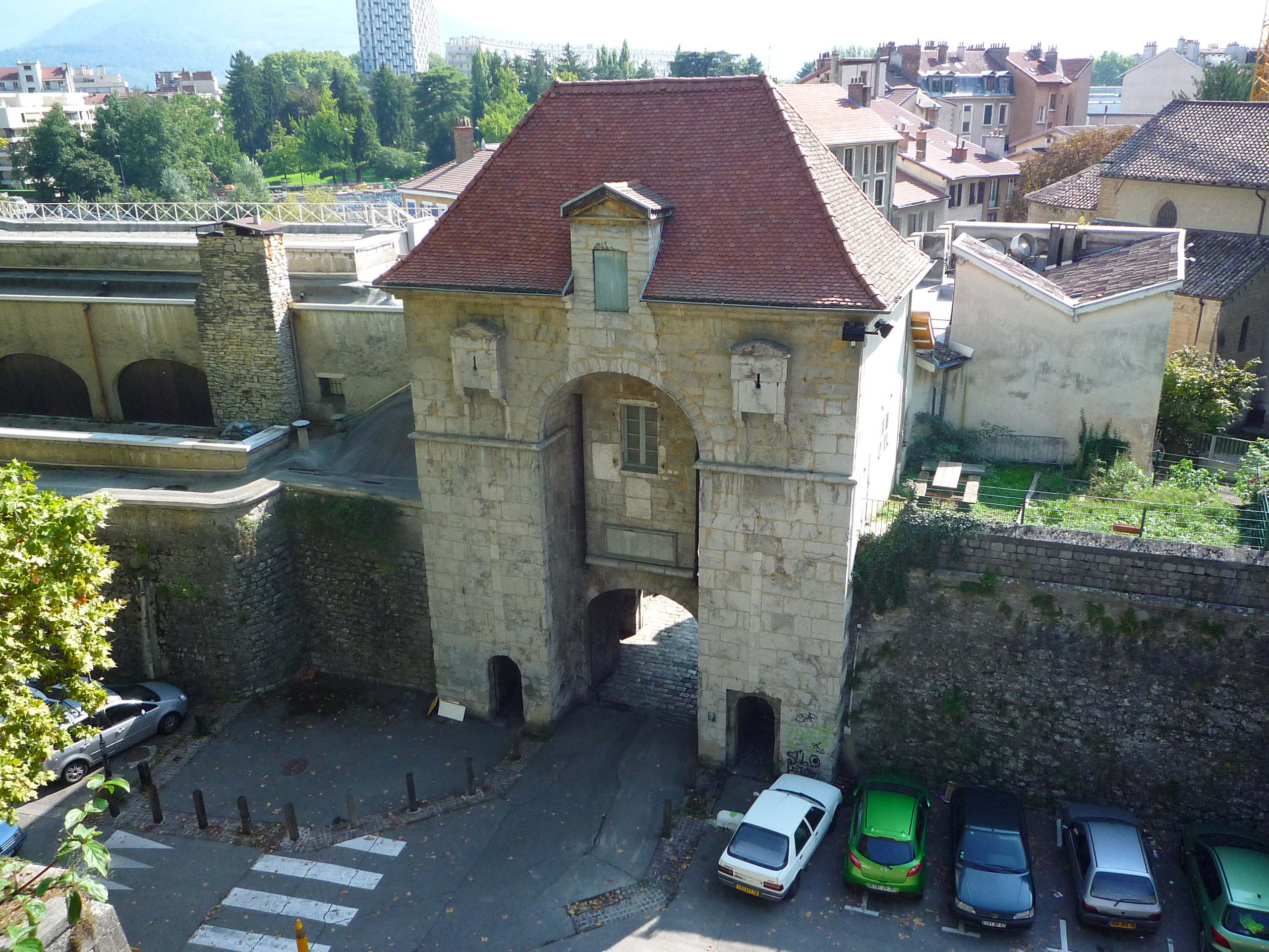 Porte Saint Laurent (1611) - Grenoble